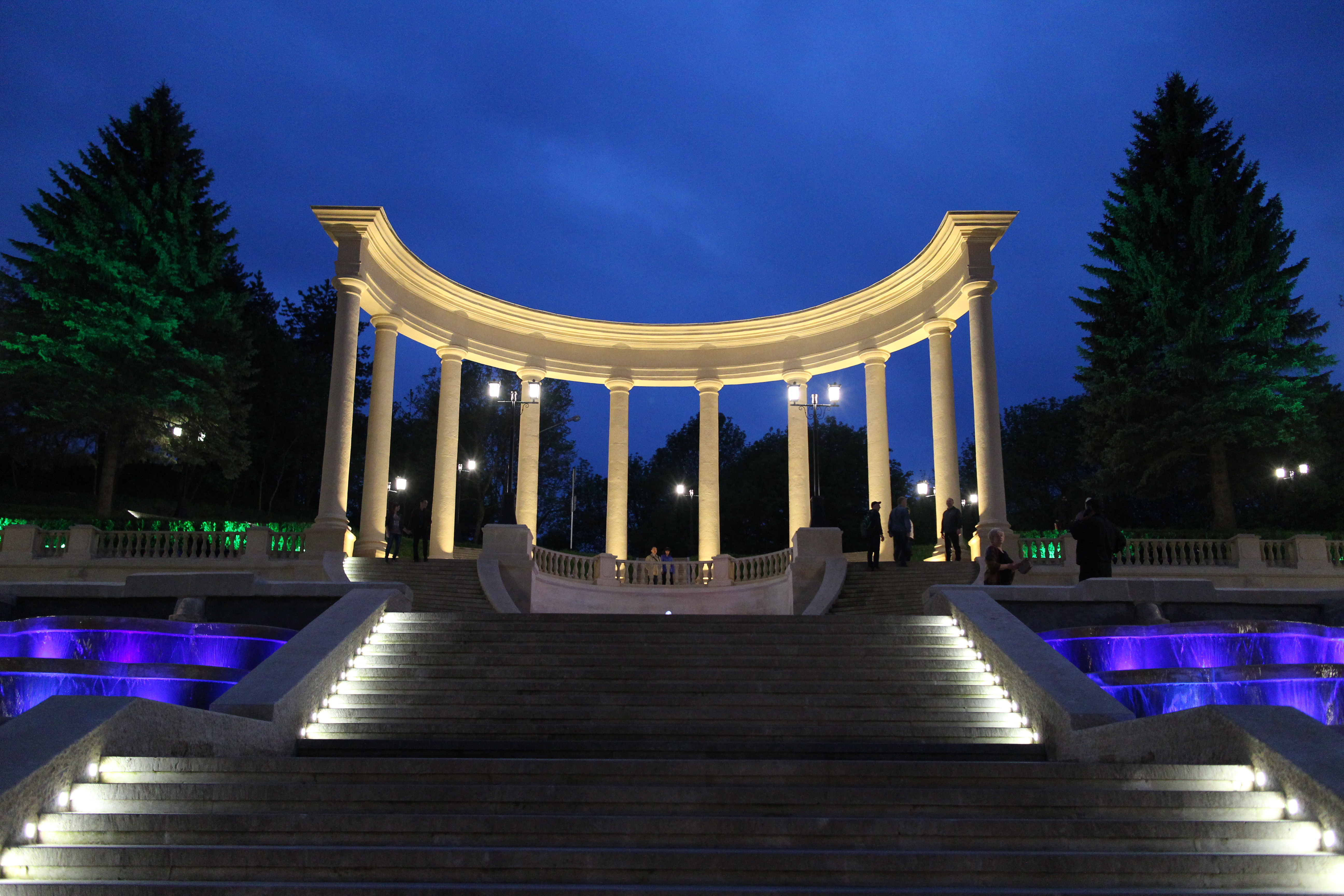 "Каскадная лестница": проспект Дзержинского, Кисловодск, Ставропольский край